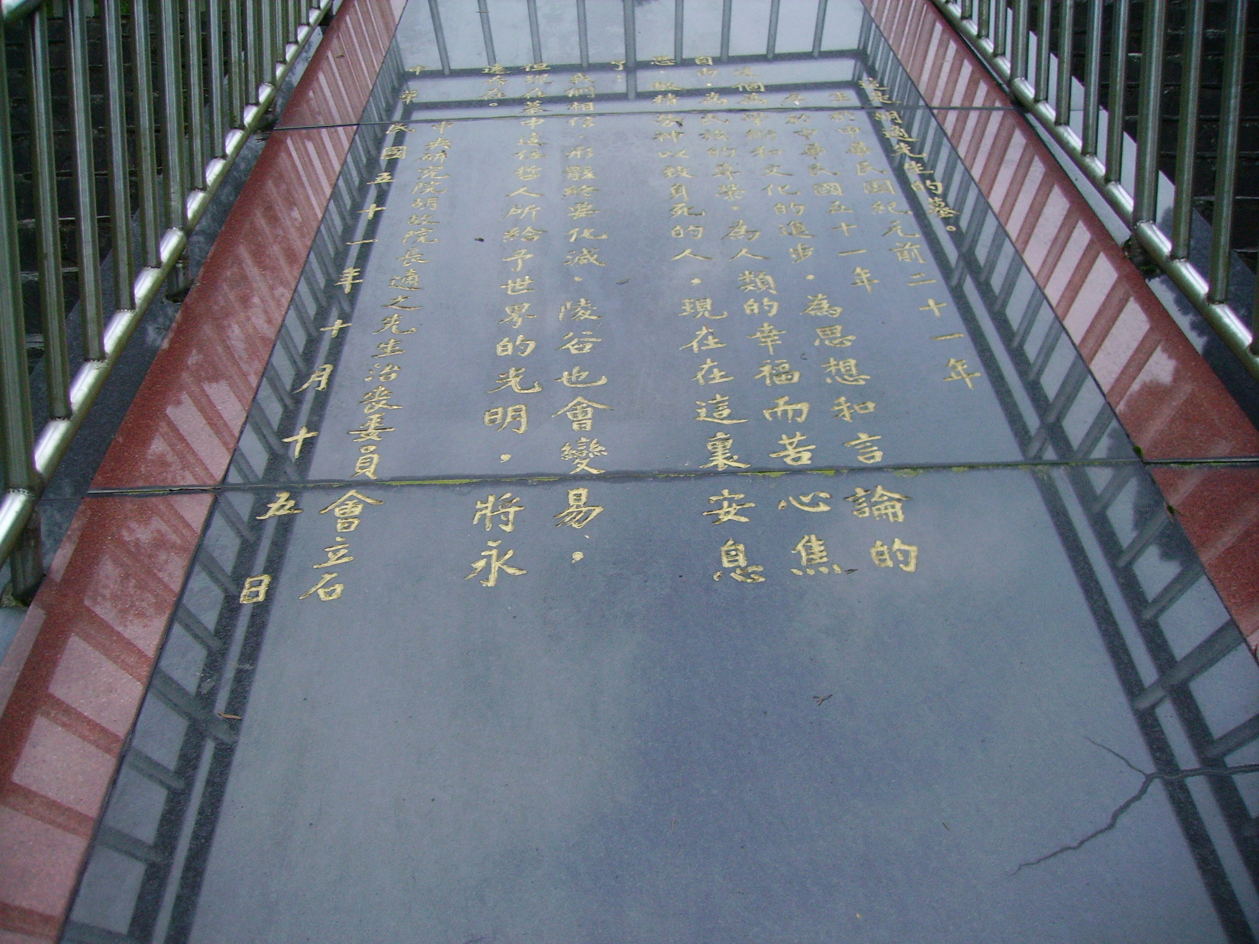 胡適墓誌銘。